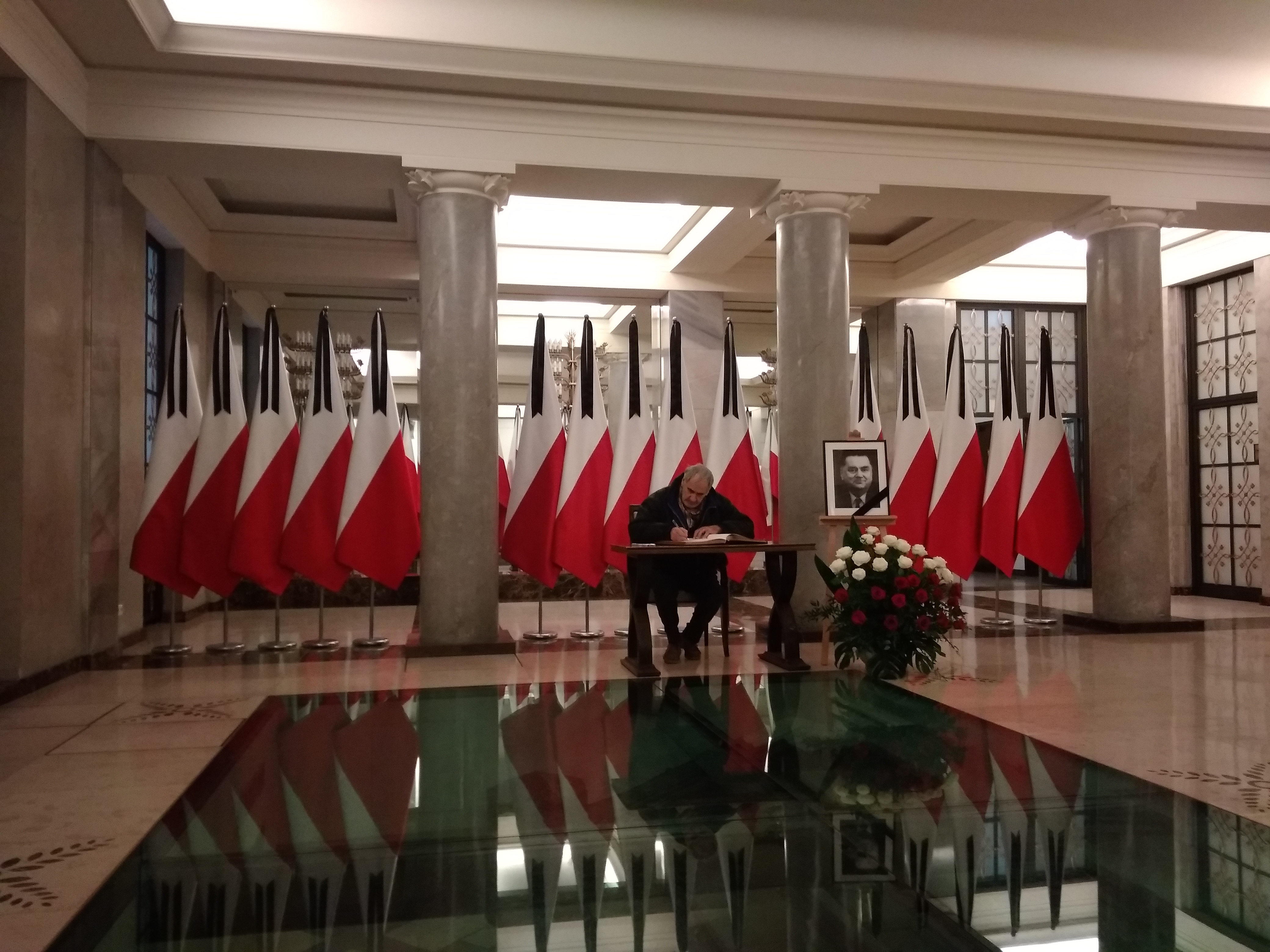 Księga kondolencyjna po śmierci premiera Jana Olszewskiego w Kancelarii Prezesa Rady Ministrów w Warszawie.